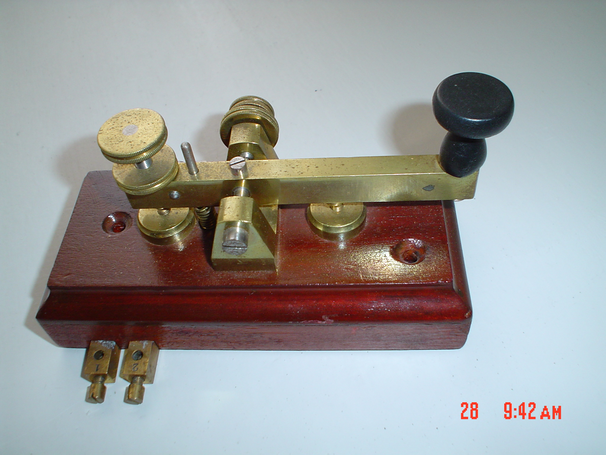 Karakteriza sendilo de Morsa-aparato